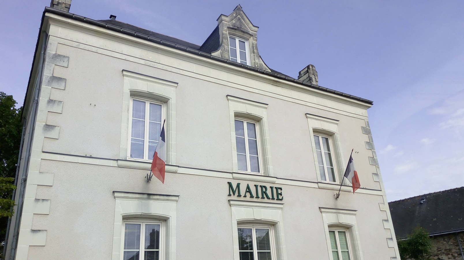 Mairie de la commune de Cantenay-Épinard (Maine-et-Loire, France).